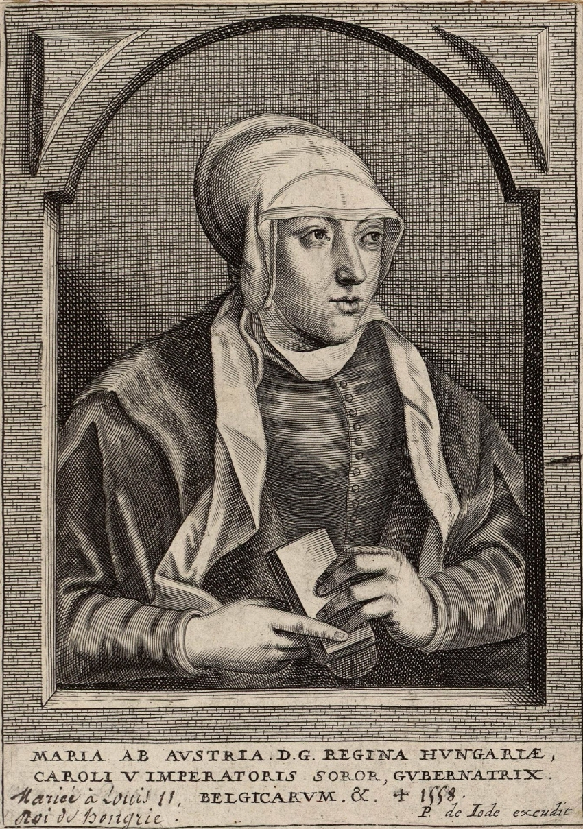 gravure de Marie de Hongrie